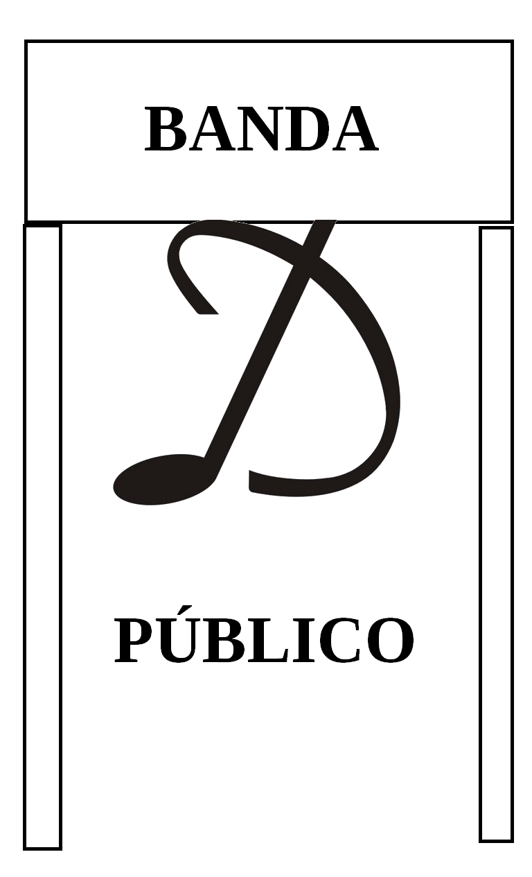 Desenho do Palco usado na gravação de Creio.